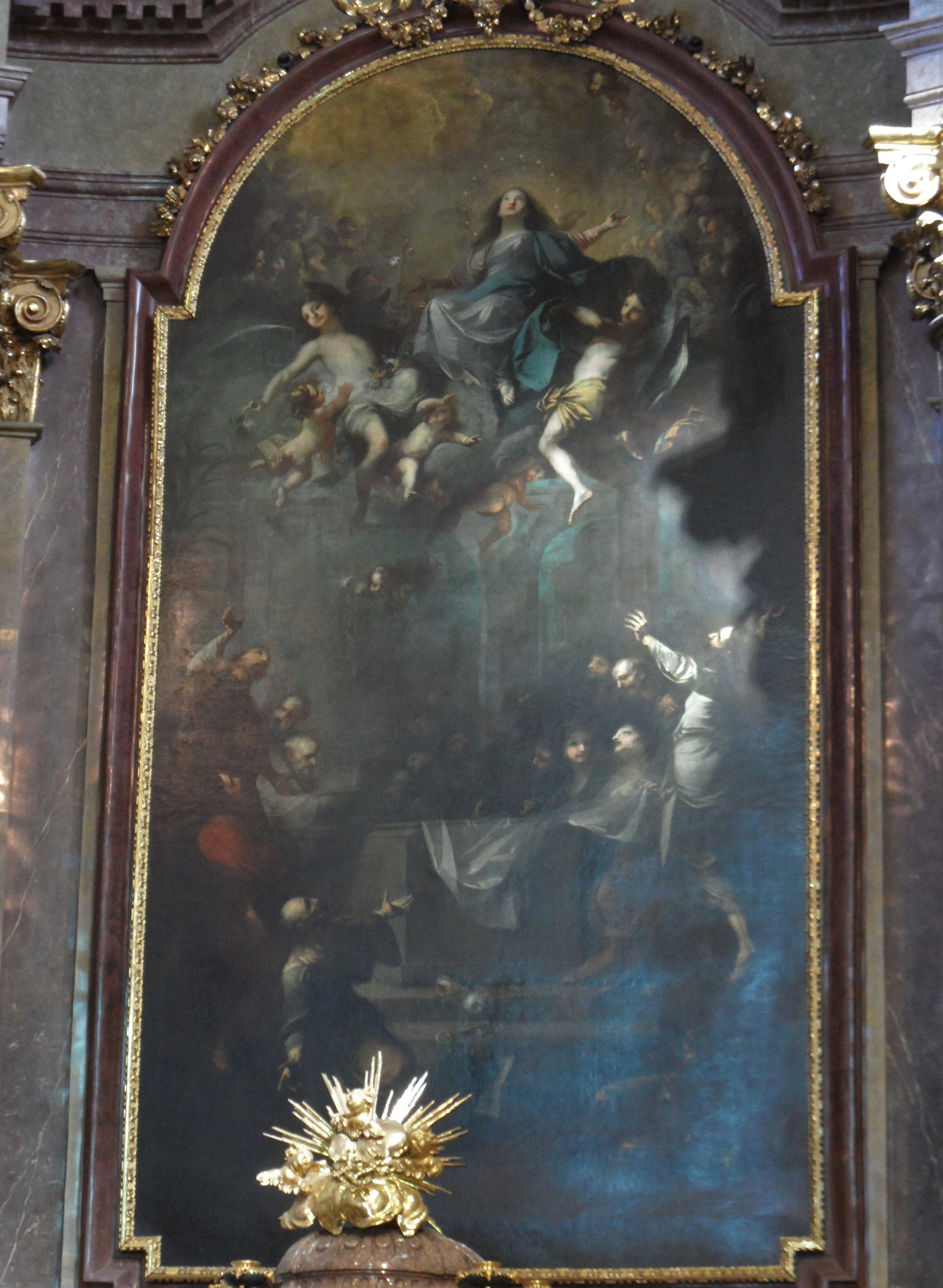 Kostel Nanebevzetí Panny Marie, Brno-Zábrdovice - hlavní oltář, obraz Nanebevzetí P. Marie - Franz A. Maulbertsch (1782)